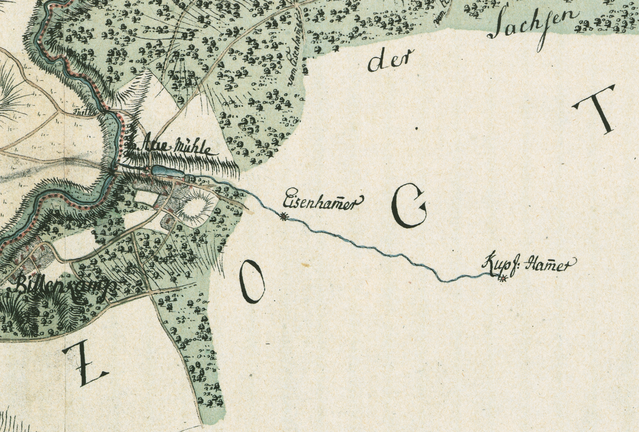 Ausschnitt aus Image:Varendorf(64)Glinde Schwarzenbek.jpg:Schwarze Au im Sachsenwald. Aufgenommen in den Jahren 1789 bis 1796 unter der Direktion des Majors Gustav Adolf von Varendorf durch Offiziere des Schleswigschen Infanterieregiments